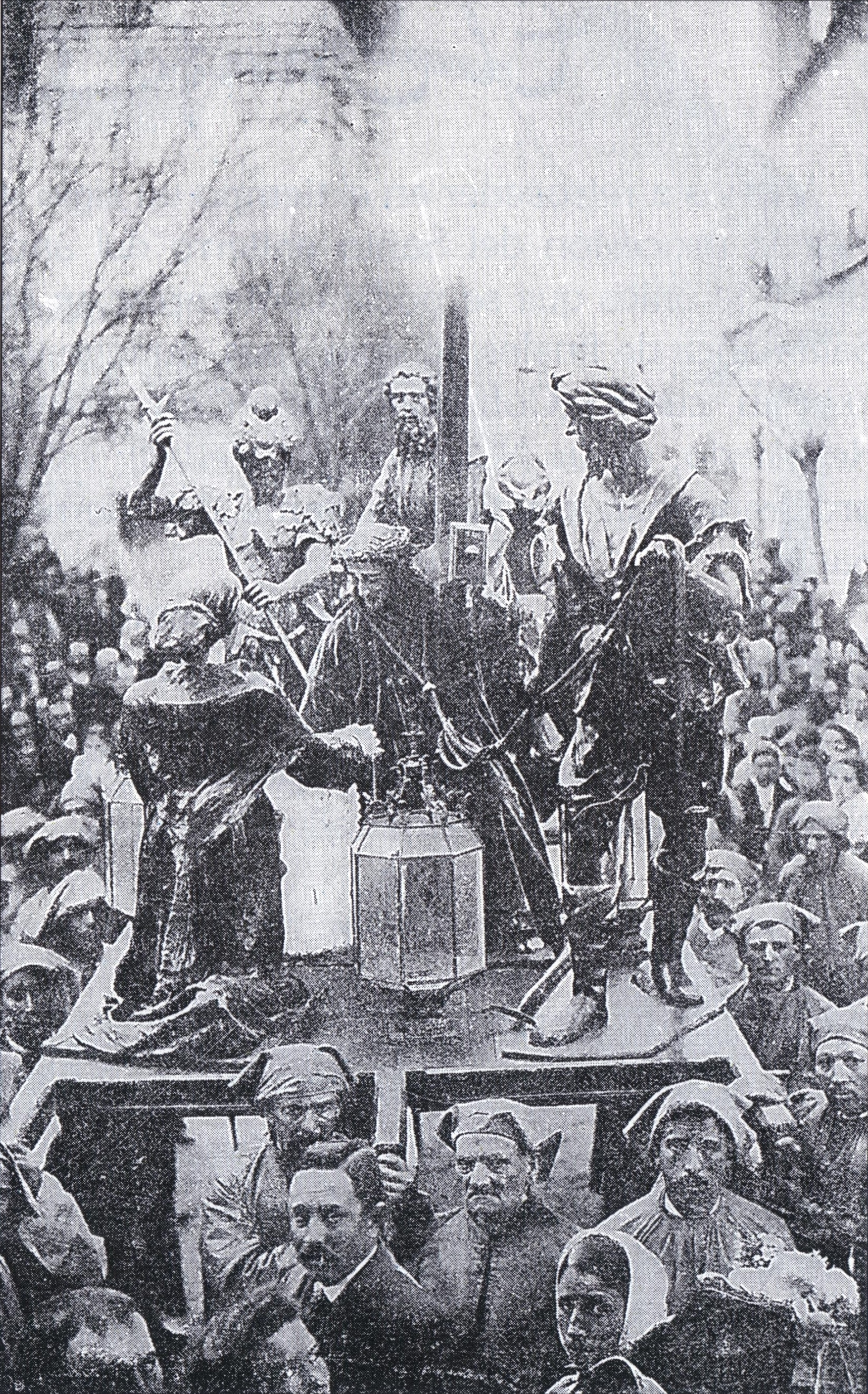 Paso de la Caída de la Cofradía de la Vera Cruz de Salamanca, en la procesión del Santo Entierro celebrada el Viernes Santo 8 de abril de 1898 a su paso por la plaza de las Agustinas.